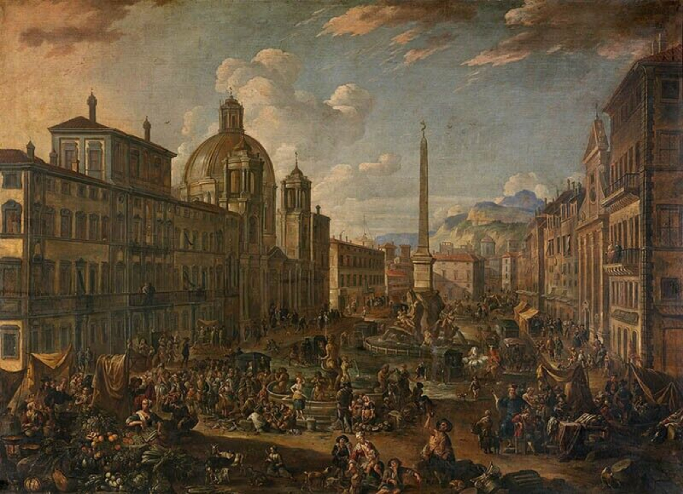 De Piazza Navone in RomeThe Piazza Navone in Rometitle QS:P1476,nl:"De Piazza Navone in Rome" label QS:Lnl,"De Piazza Navone in Rome" label QS:Lfr,"Piazza Navone à Rome" label QS:Len,"The Piazza Navone in Rome"